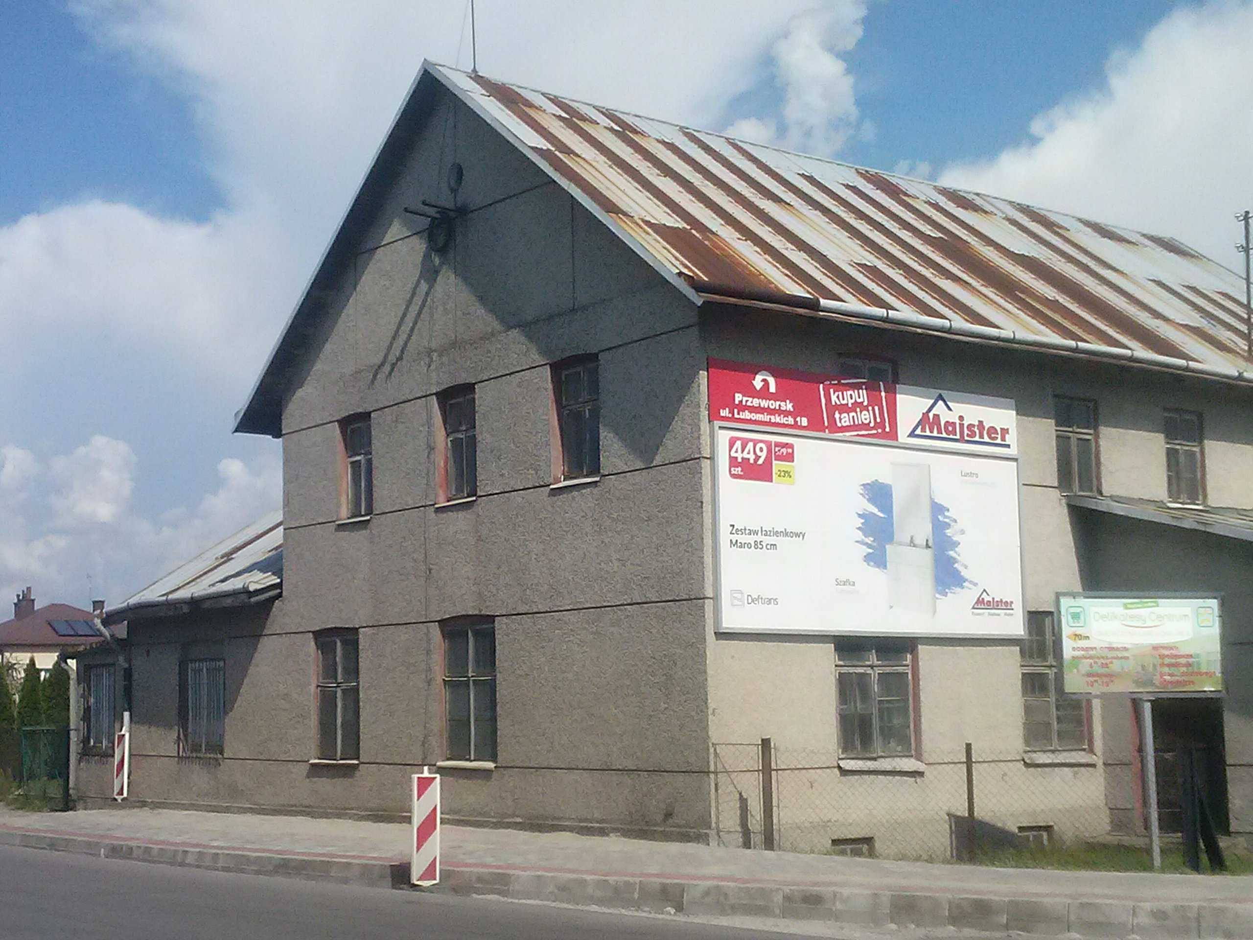 Młyn w Gniewczynie Łańcuckiej (1) - obecnie nieczynny